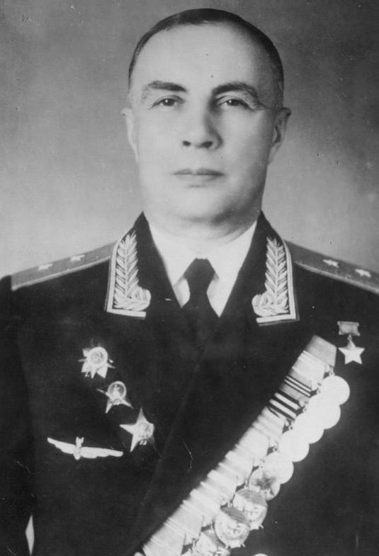 Александр Васильевич Беляков (1897—1982) — советский военачальник, Герой Советского Союза (1936), генерал-лейтенант авиации